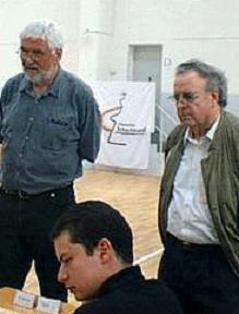 Hans Besser (Deutscher Meister 1967), Joel Lautier und Egon Evertz, 2002 in Solingen bei der Deutschen Blitzmannschaftsmeisterschaft im Schach.